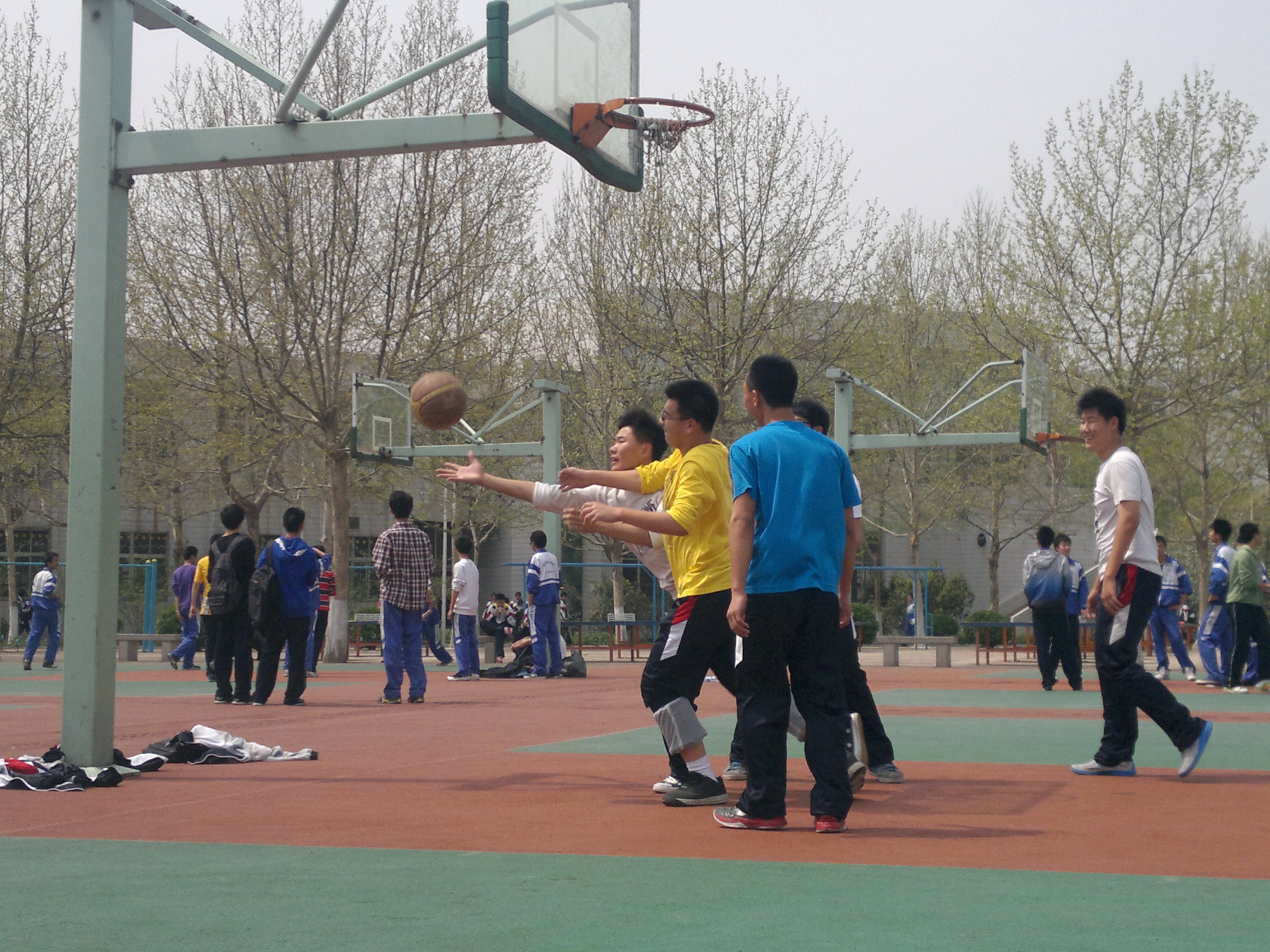 篮球场上运动的学生